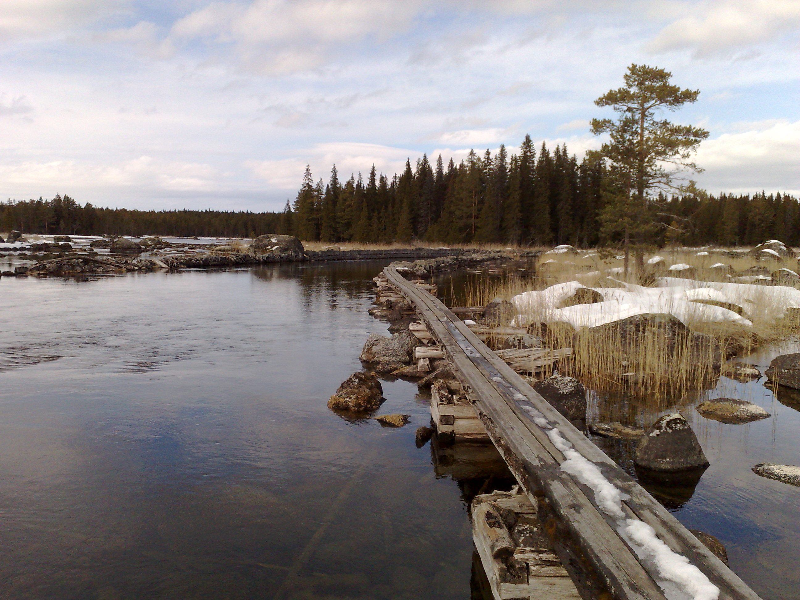 Gimån